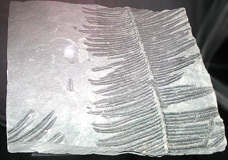 Fotografía digital realizada por Pablo Alberto Salguero Quiles